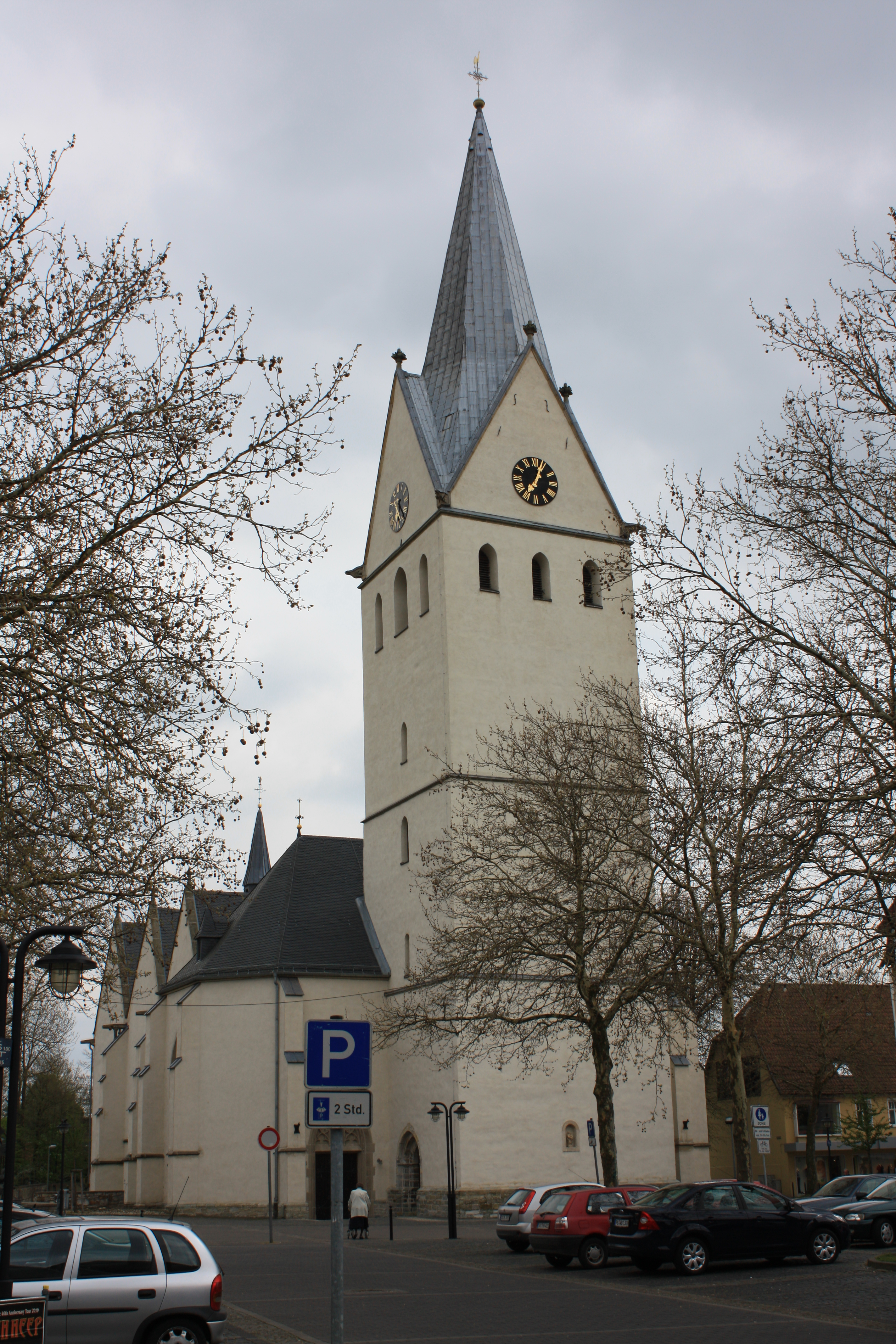 Turm von St. Petri in Geseke